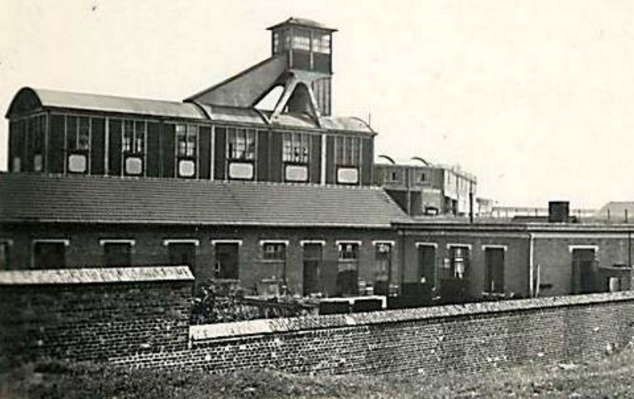 La fosse n° 2 de la Compagnie des mines de Béthune était un charbonnage constitué d'un seul puits situé à Bully-les-Mines, Pas-de-Calais, Nord-Pas-de-Calais, France.